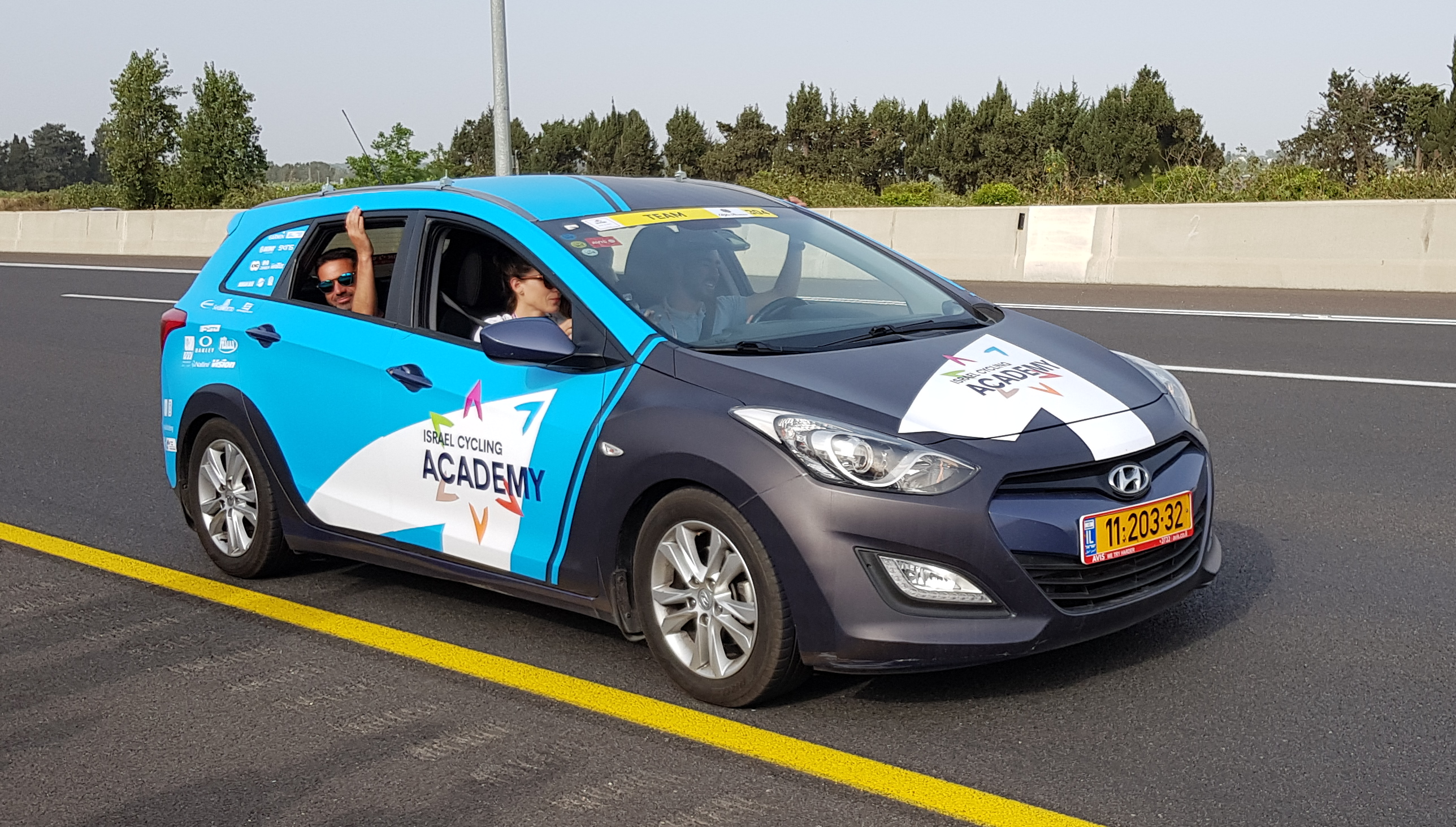 רכב של קבוצת הרכיבה Israel Cycling Academy